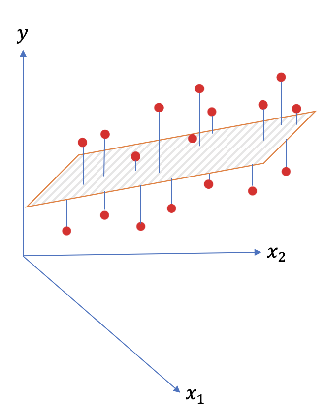 رگرسیون خطی در این شکل صفحه‌ای است که مجموع مربعات فواصل نقطه‌های قرمز تا صفحه را کمینه می‌کند.